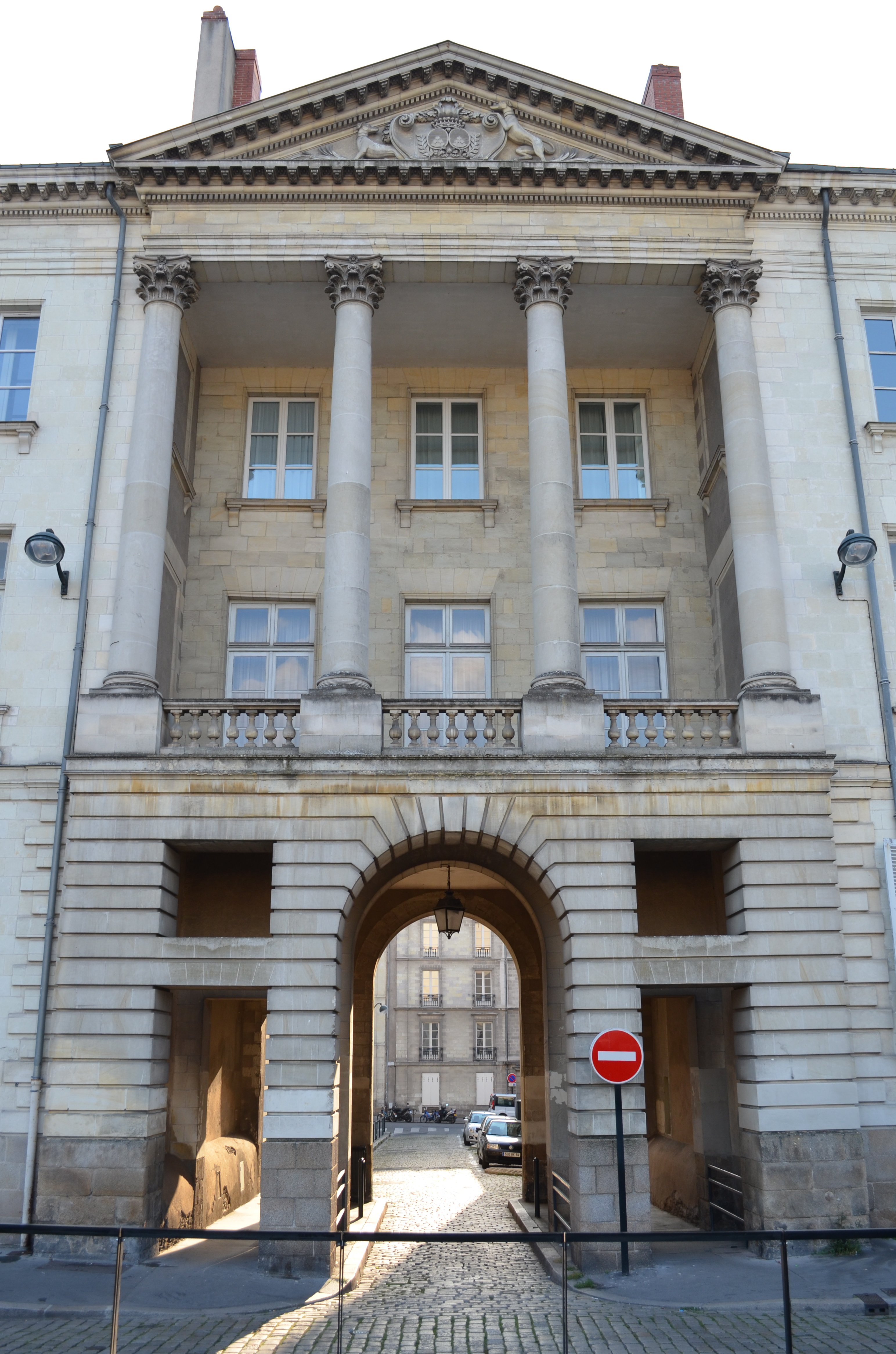 Hôtel situé place du Maréchal-Foch (18è s.), oeuvre de Jean-Baptiste Ceineray et de Mathurin Crucy - Nantes. .